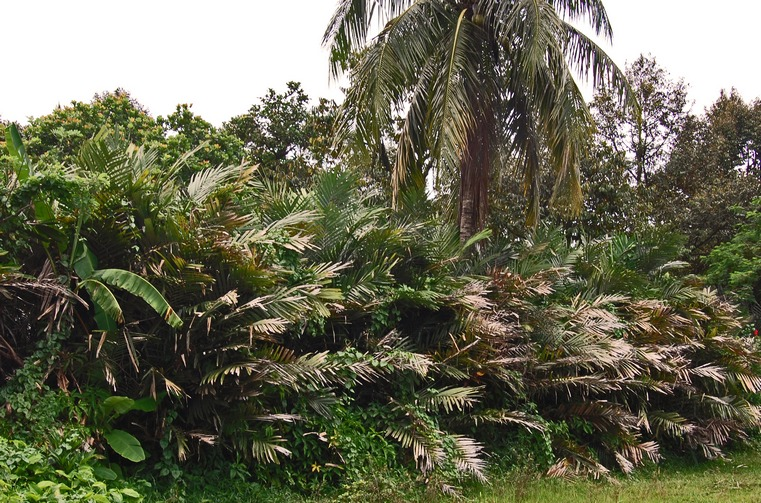 Salacca zalacca shrub, as a fence. Darmaga, Bogor, West Java, Indonesia